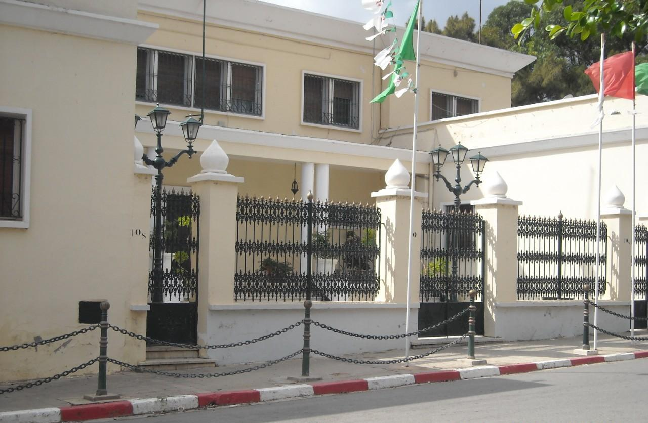 Aïn Témouchent, Algérie. Maison des hôtes de marque, anciennement sous-préfecture d'Aïn Témouchent.